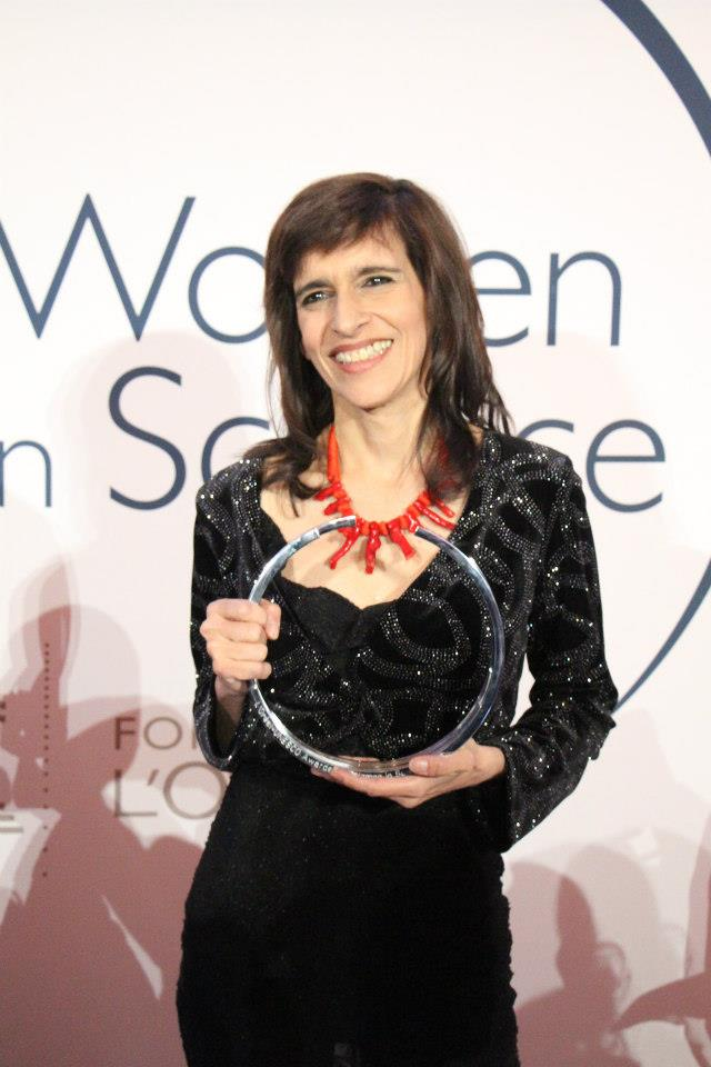 Foto de Marcia Barbosa, física brasileira. Cerimônia de entrega do prêmio Women and Science em Paris, 2013.